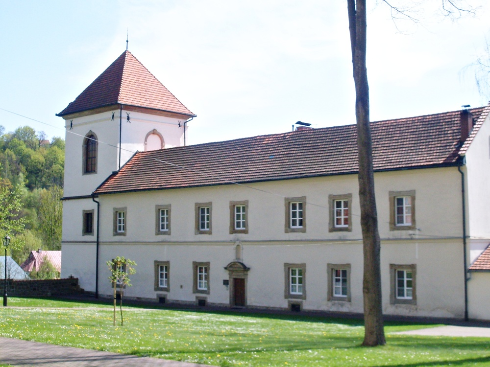 Barokowa plebania przy kościele parafialnym p.w. Wniebowzięcia NMP w Nowym Wiśniczu